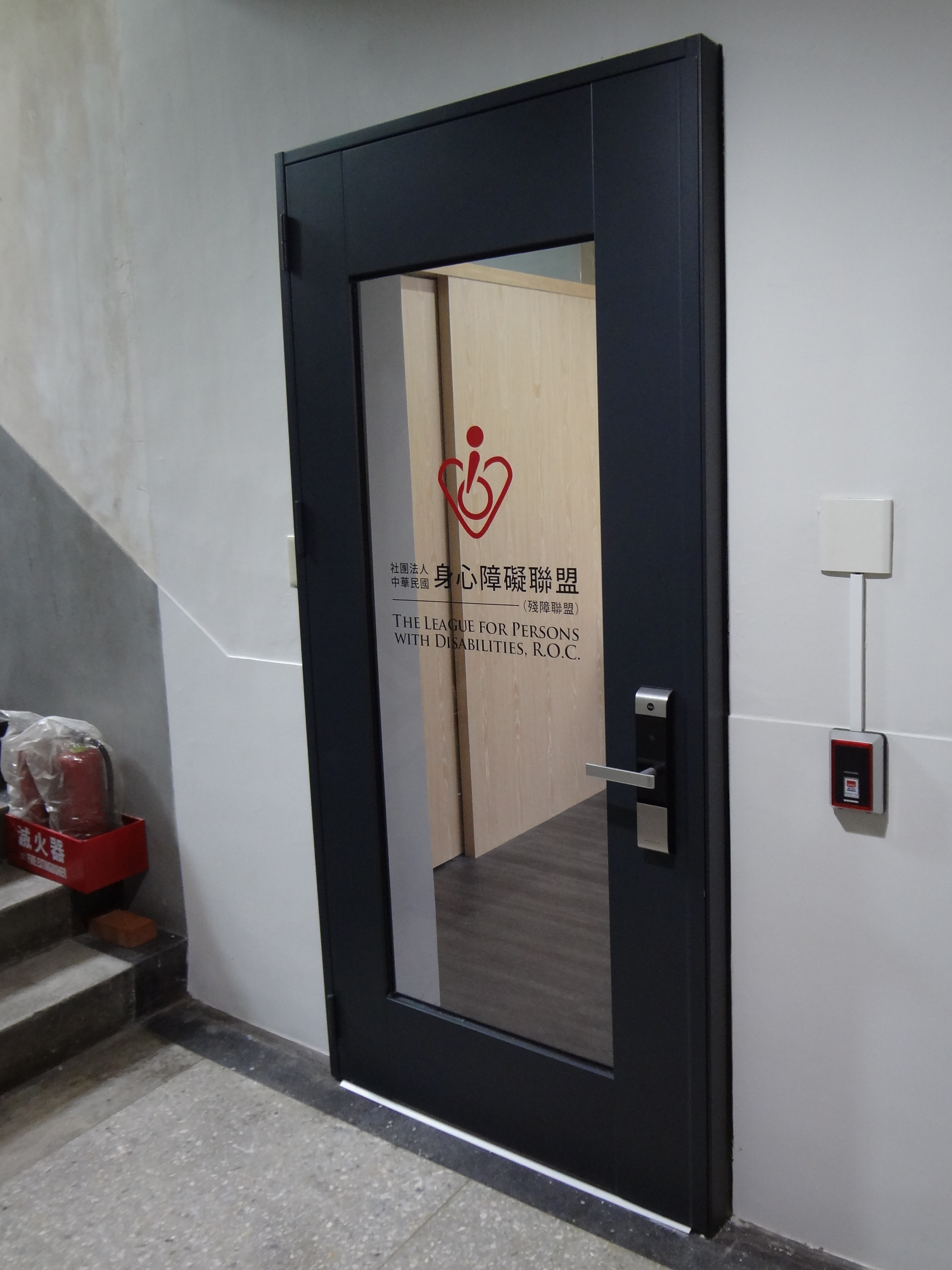 中華民國身心障礙聯盟（原中華民國殘障聯盟）總部，地址：臺北市中山區南京西路9號6樓。